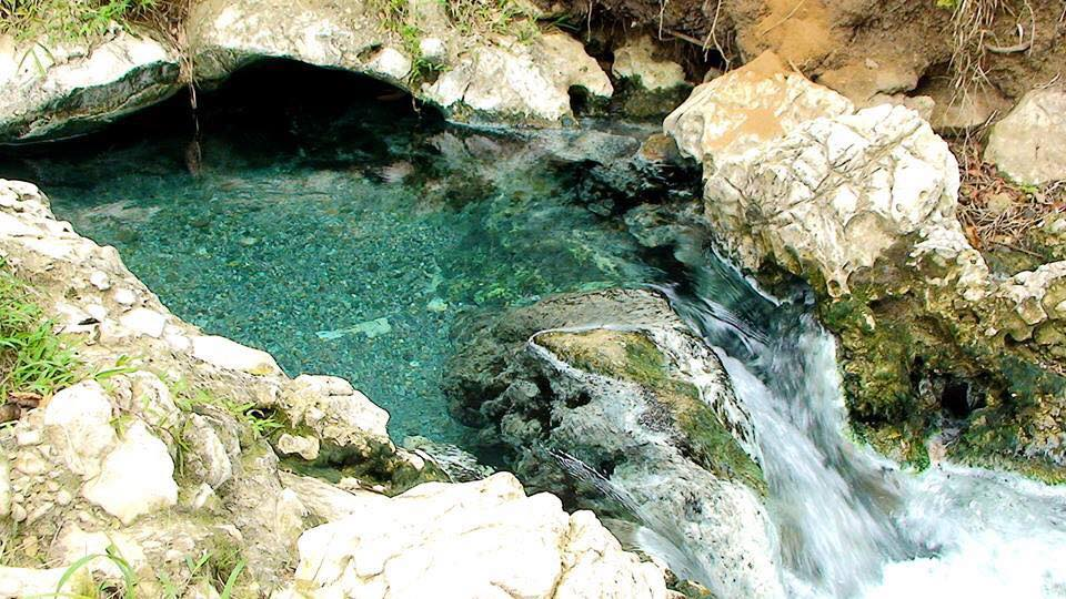 El Azufre